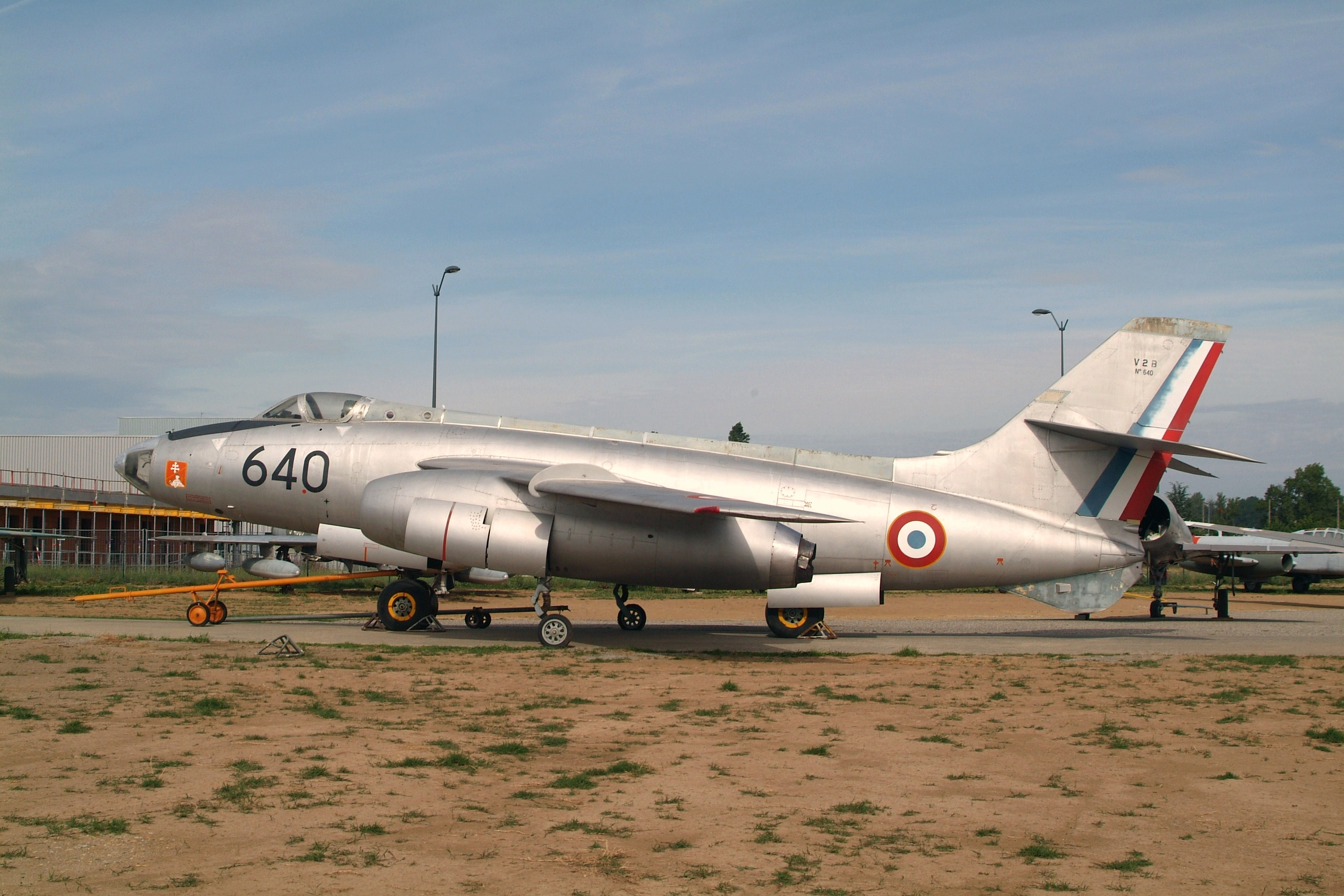 640 Sud-Est 4050 Vautour IIB French Air Force